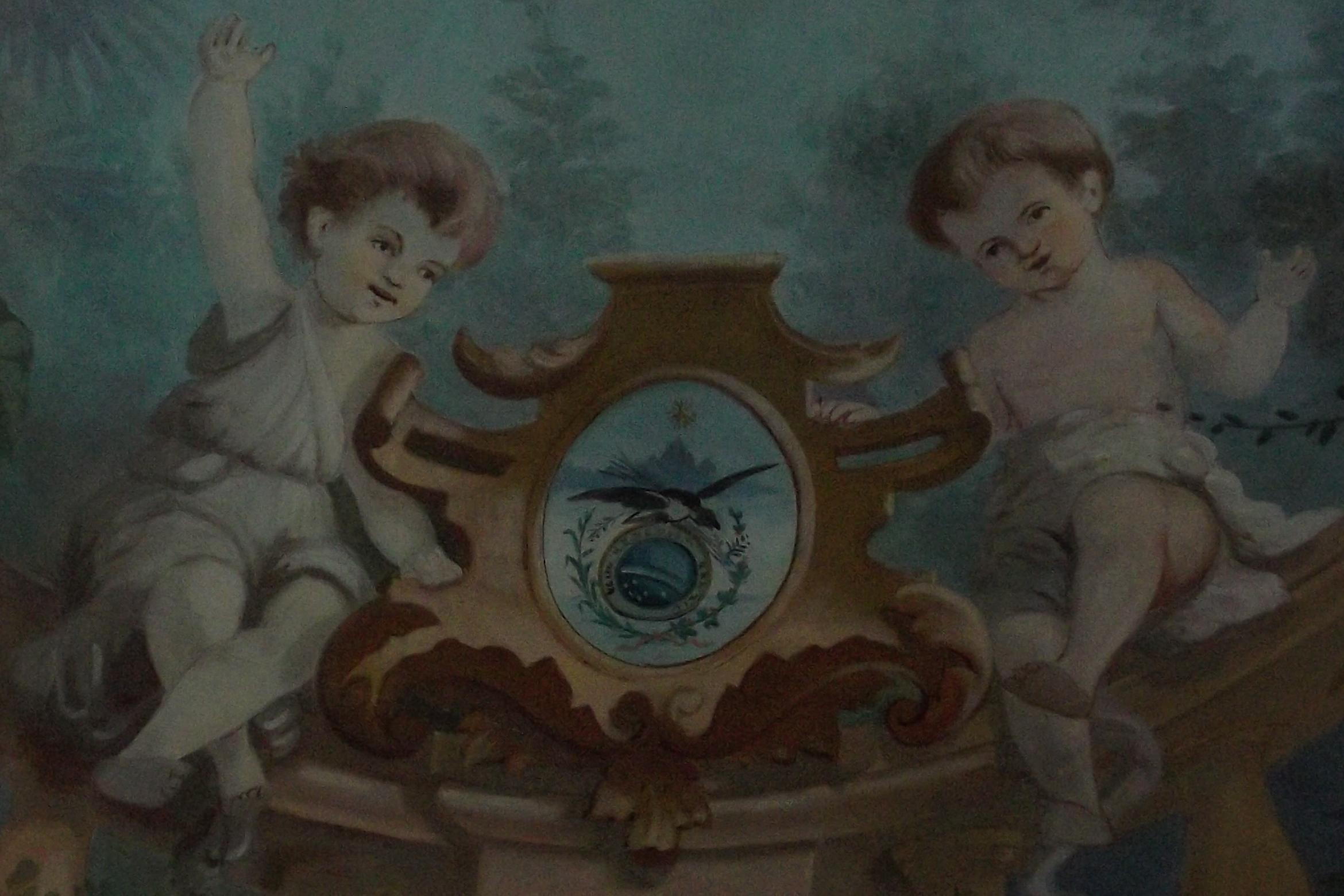 Palácio Amarelo : Câmara Municipal de Petrópolis, Estado do Rio de Janeiro, Brasil : Teto do Plenário : Detalhe Brasão do Estado do Rio de Janeiro